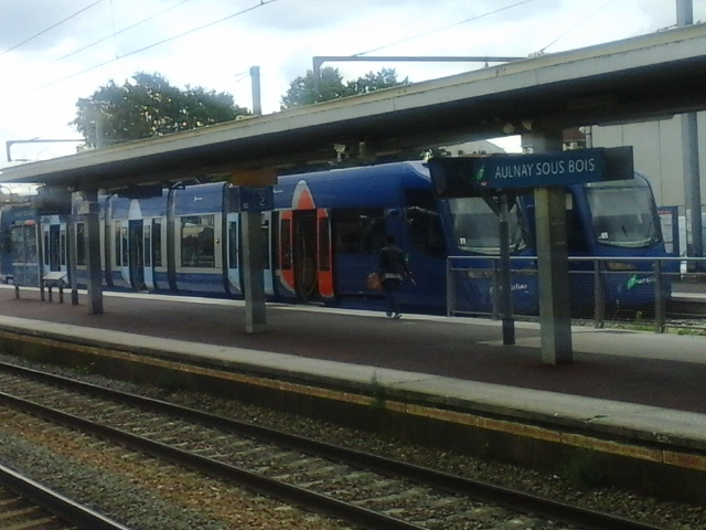 2 Siemens Avant stationnent en gare d'Aulnay-Sous-Bois, en 2017.